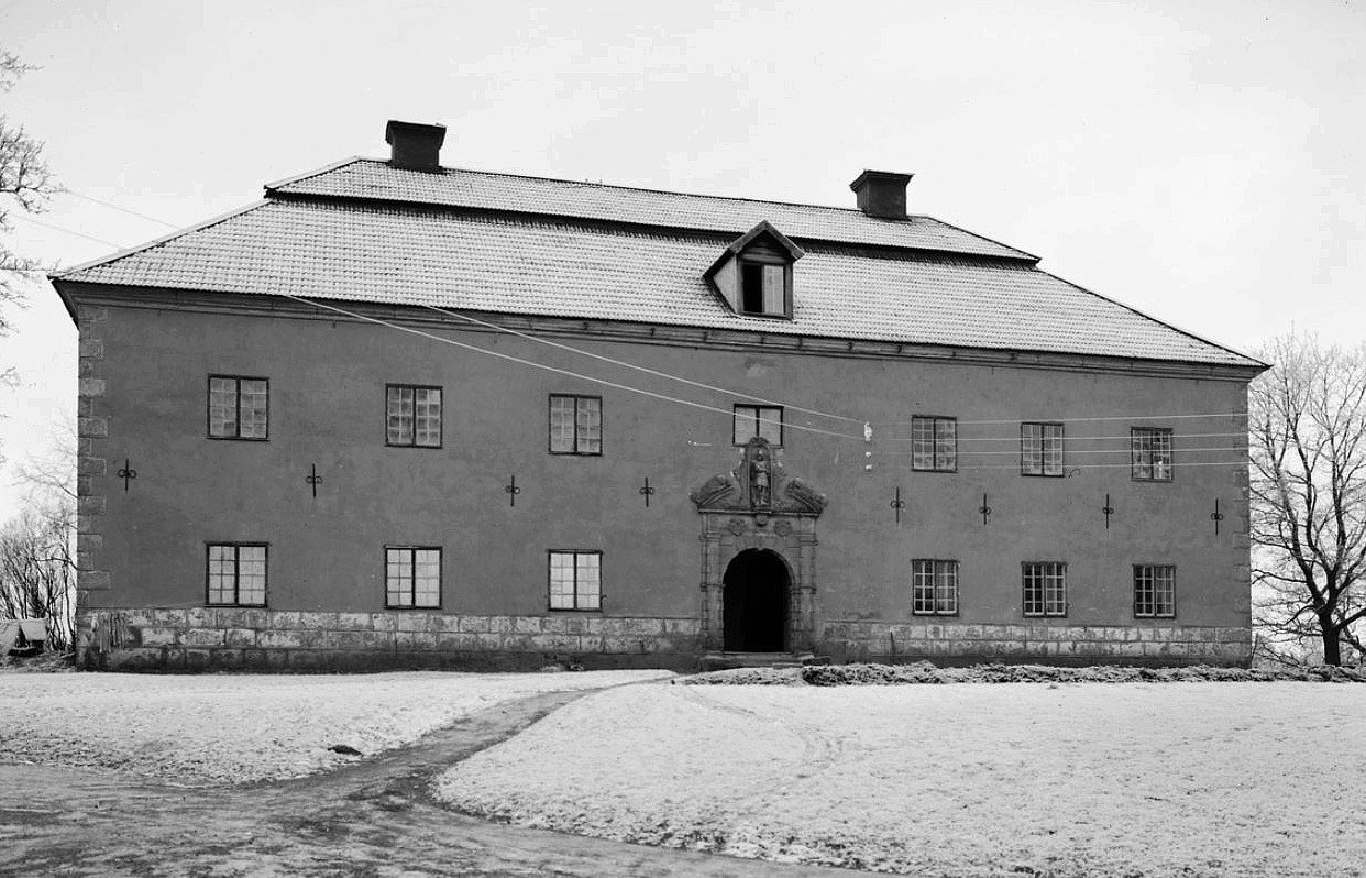 Årby, Rasbokil, huvudbyggnaden 1936